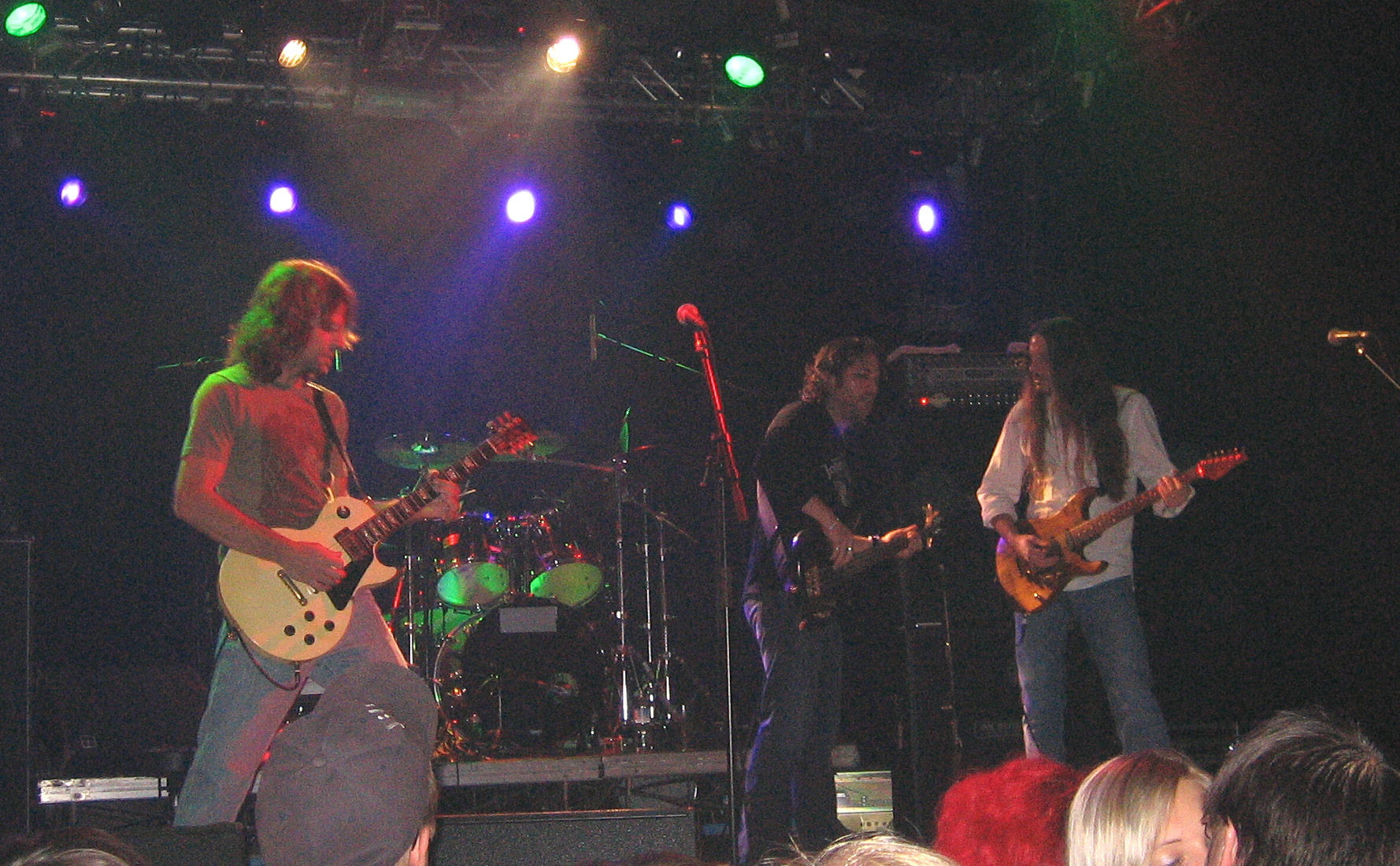 Winger Nosturissa 15.10.2006